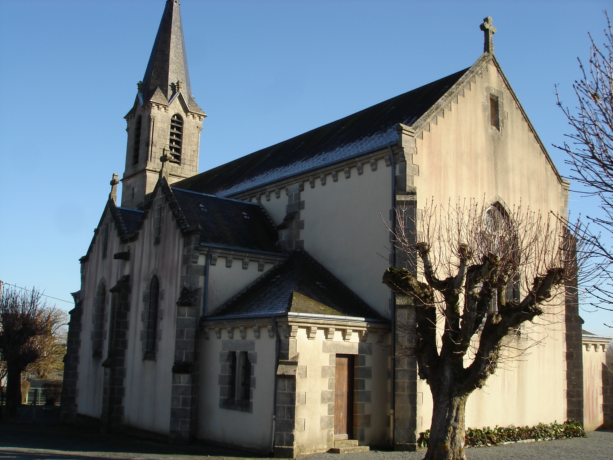 Sazeray (36) : L'église Saint-Martin.